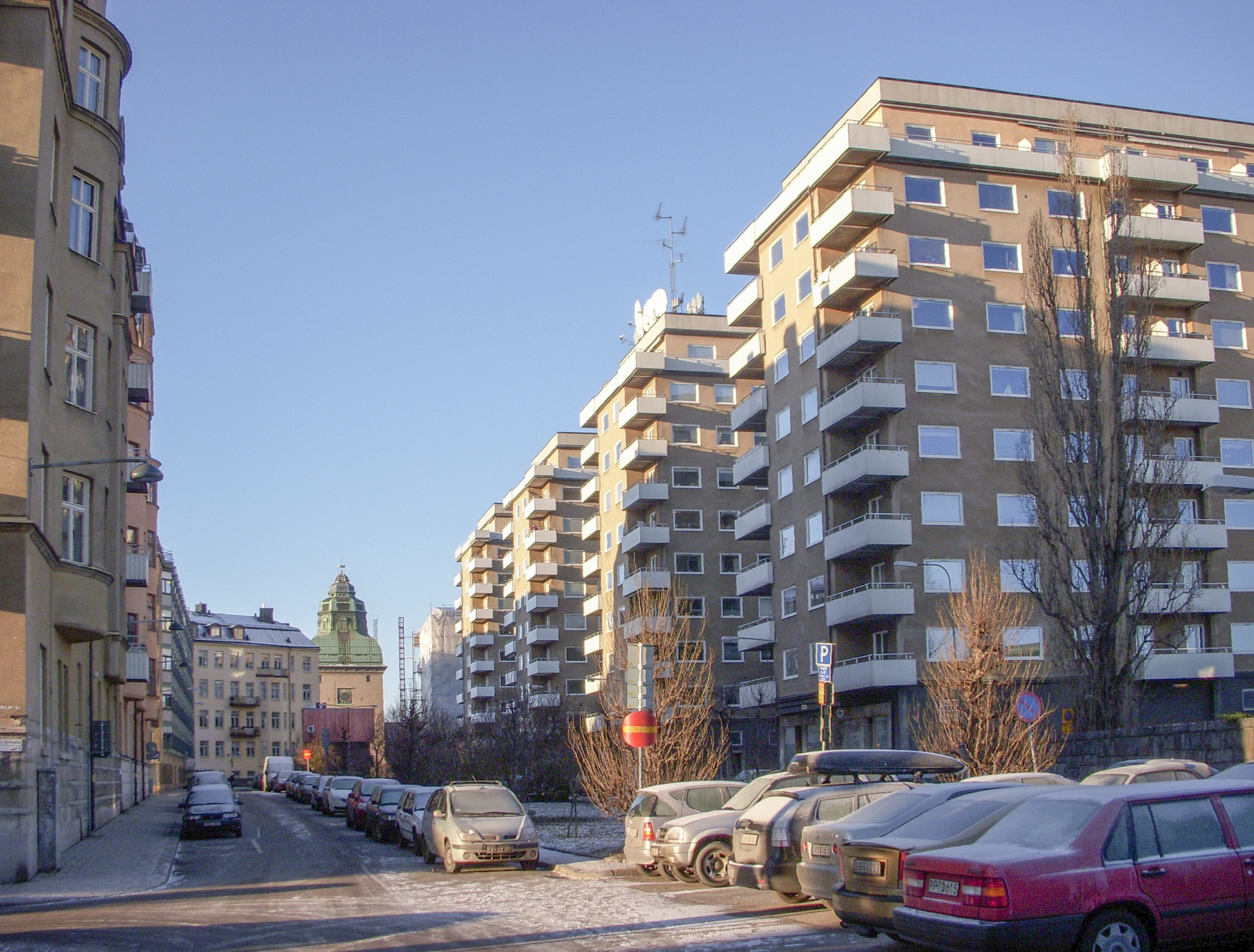 Kungsklippan på Kungsholmen i Stockholm. I bakgrunden syns Stockholms rådhusets torn.